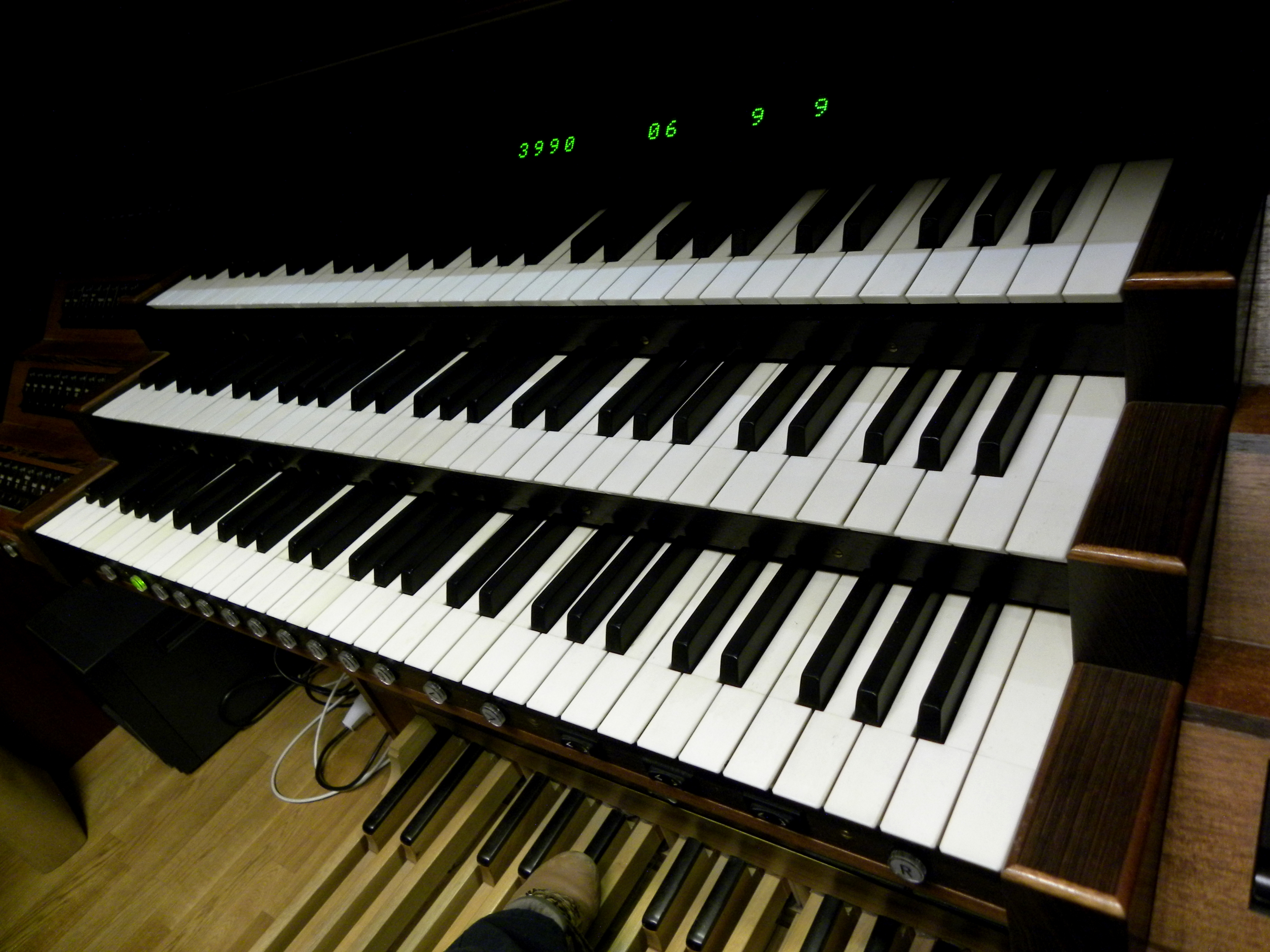 Manuały organowe (klawiatury ręczne). FN w Warszawie.